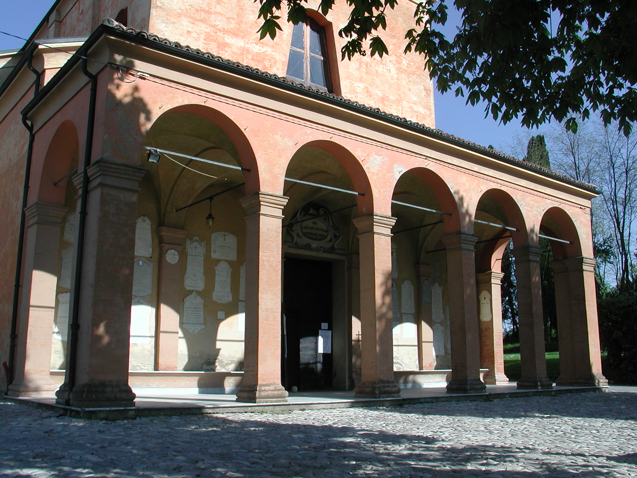 Albinea, provincia di Reggio Emilia, Italy foto di Paolo da Reggio